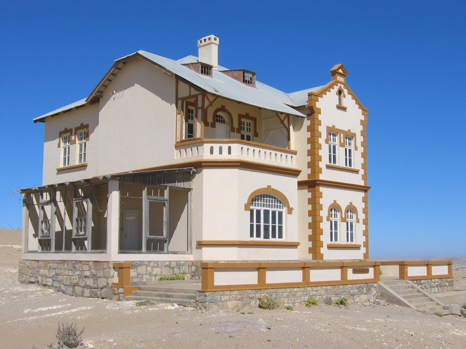 Minenverwalter, Kolmannskuppe, Namibia